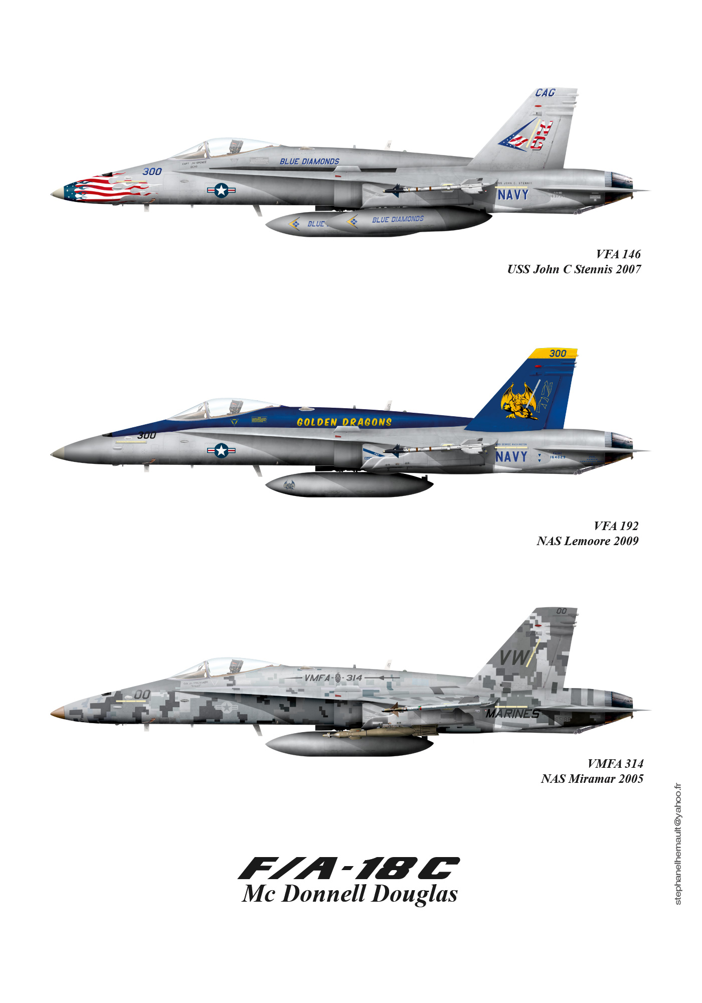 Mc Donnell Douglas F/A 18C